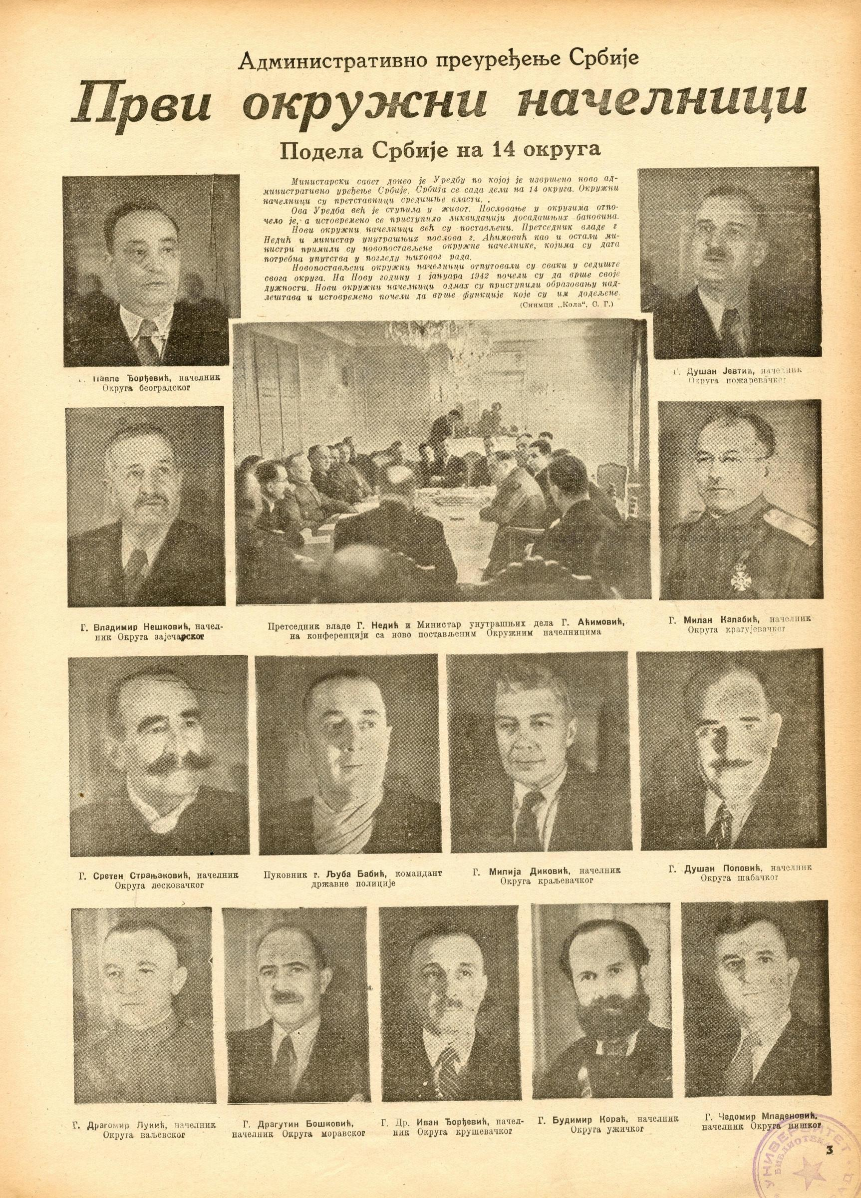 "Administrativno preuređenje Srbije" "Prvi okružni načelnici" "Podela Srbije na 14 okruga"